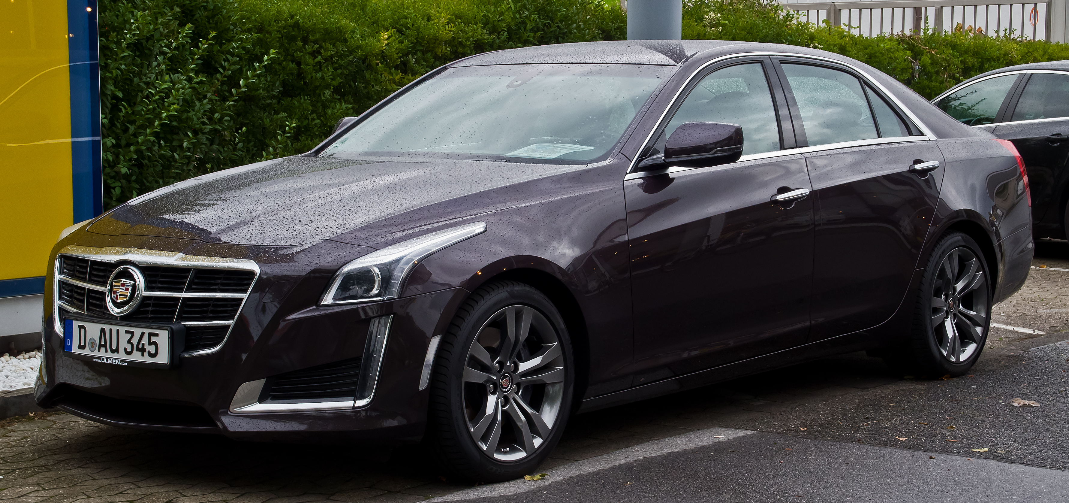 Cadillac CTS 2.0 Turbo Luxury (III)